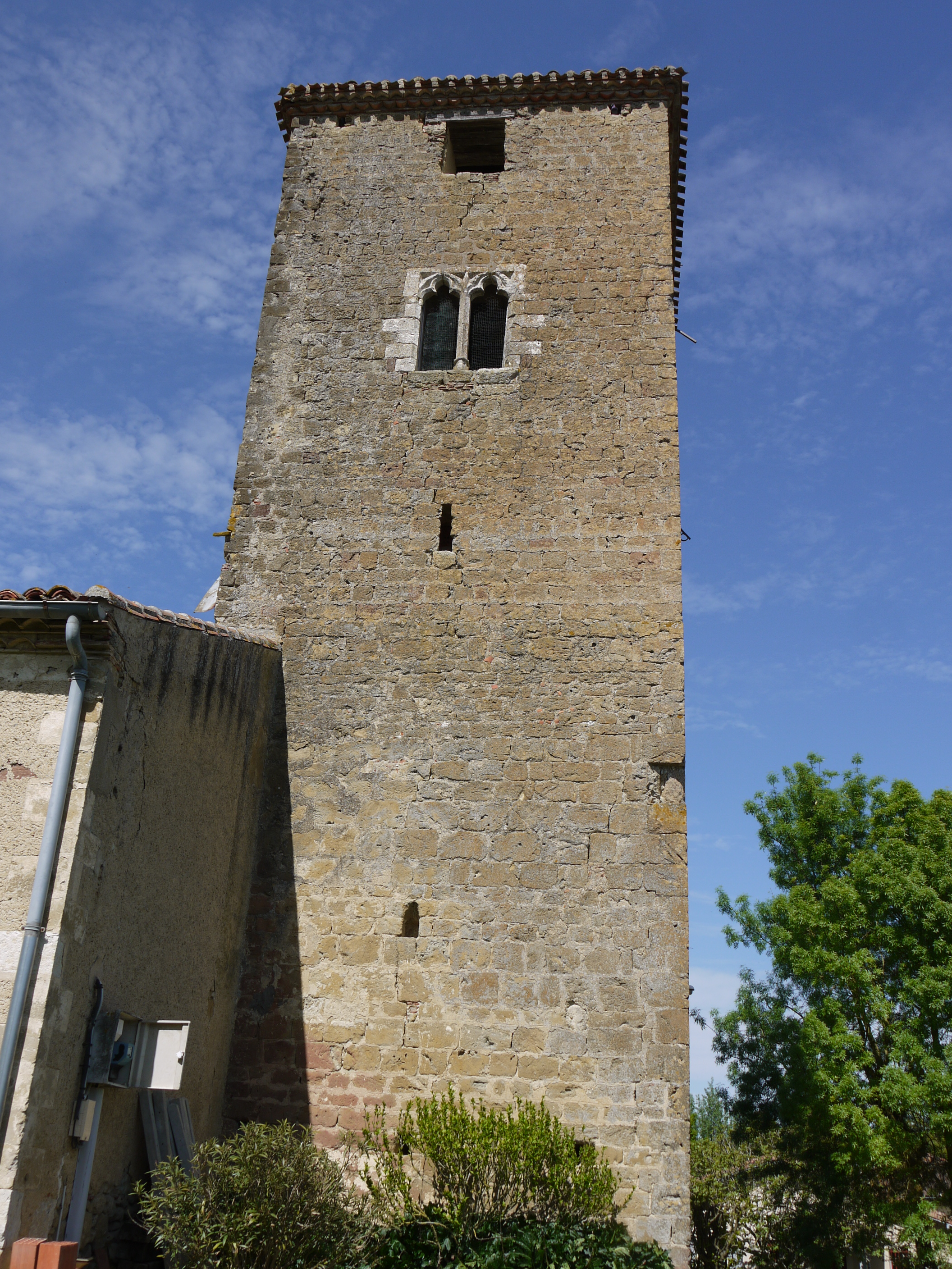 Le côté sud du clocher de l'église Saint-André de Lahitte .